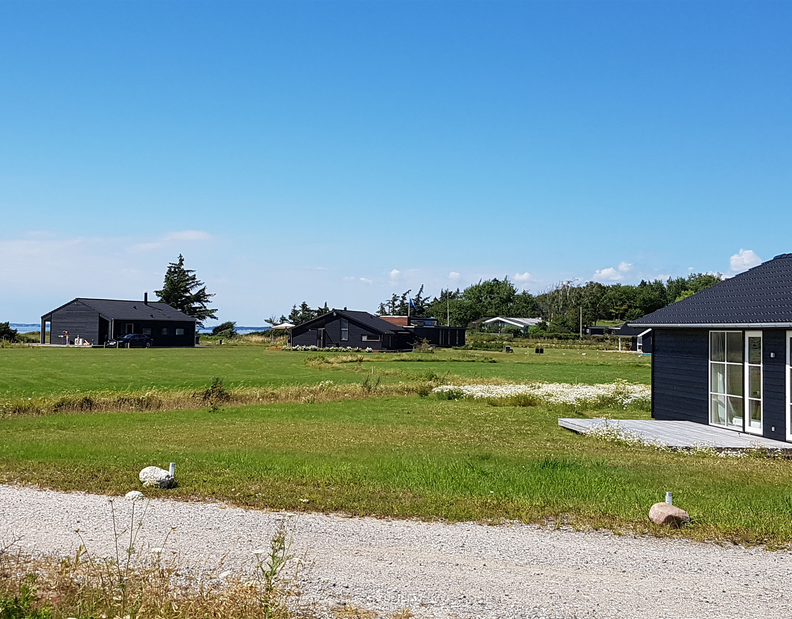 Her ses den åbne udstykning Soløje Strandvej, der ligger, hvor den gamle campingplads, Svinø Strand Camping lå.